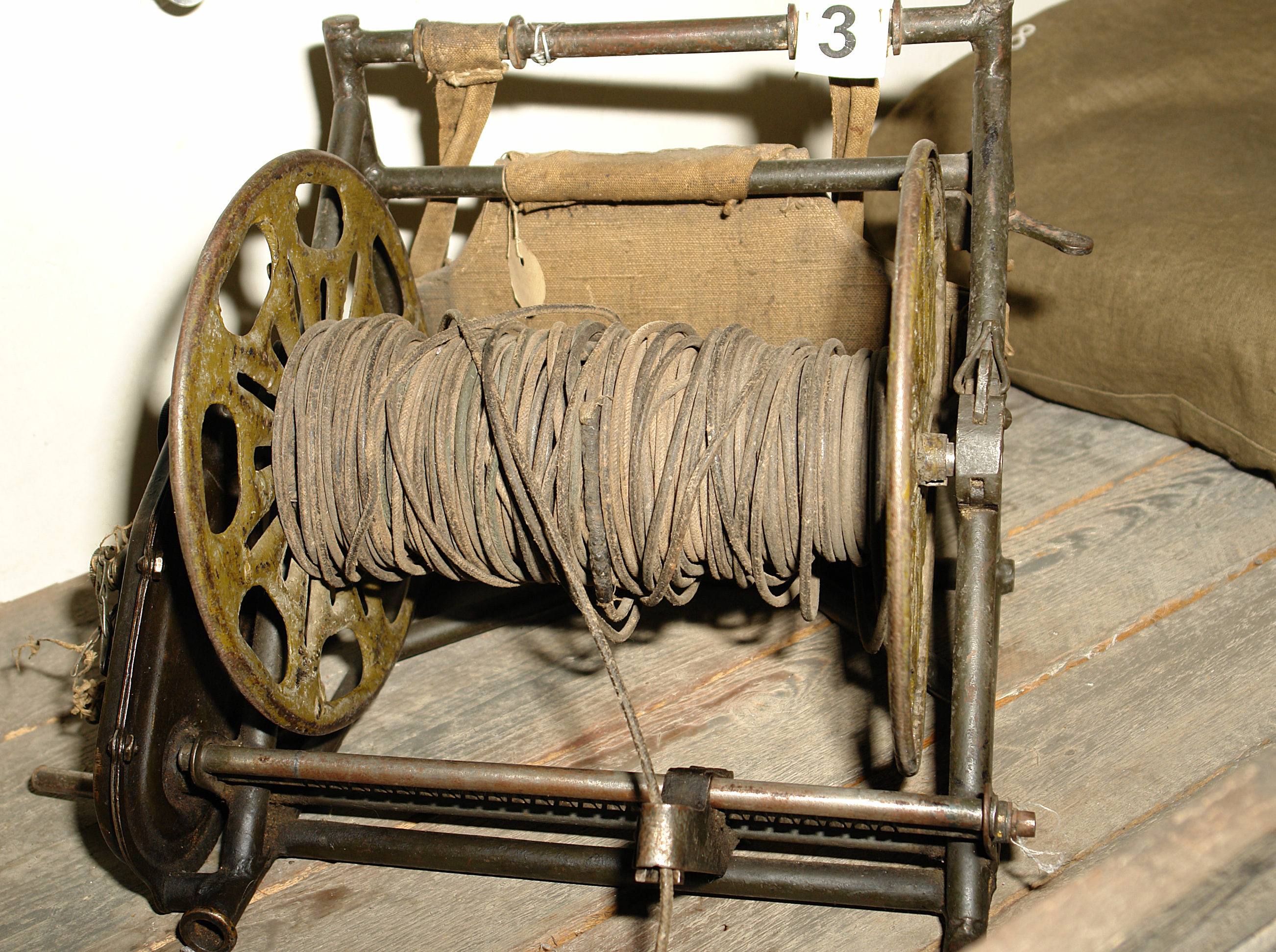 ТЕЛЕФОННАЯ КАТУШКА обр.1933 г. Принята на вооружение частей Красной Армии в 1933 году. Предназначена для намотки и размотки полевого телефонного кабеля ПТФ-7 из положения «на спине». Военно-исторический музей артиллерии, инженерных войск и войск связи, Санкт-Петербург.